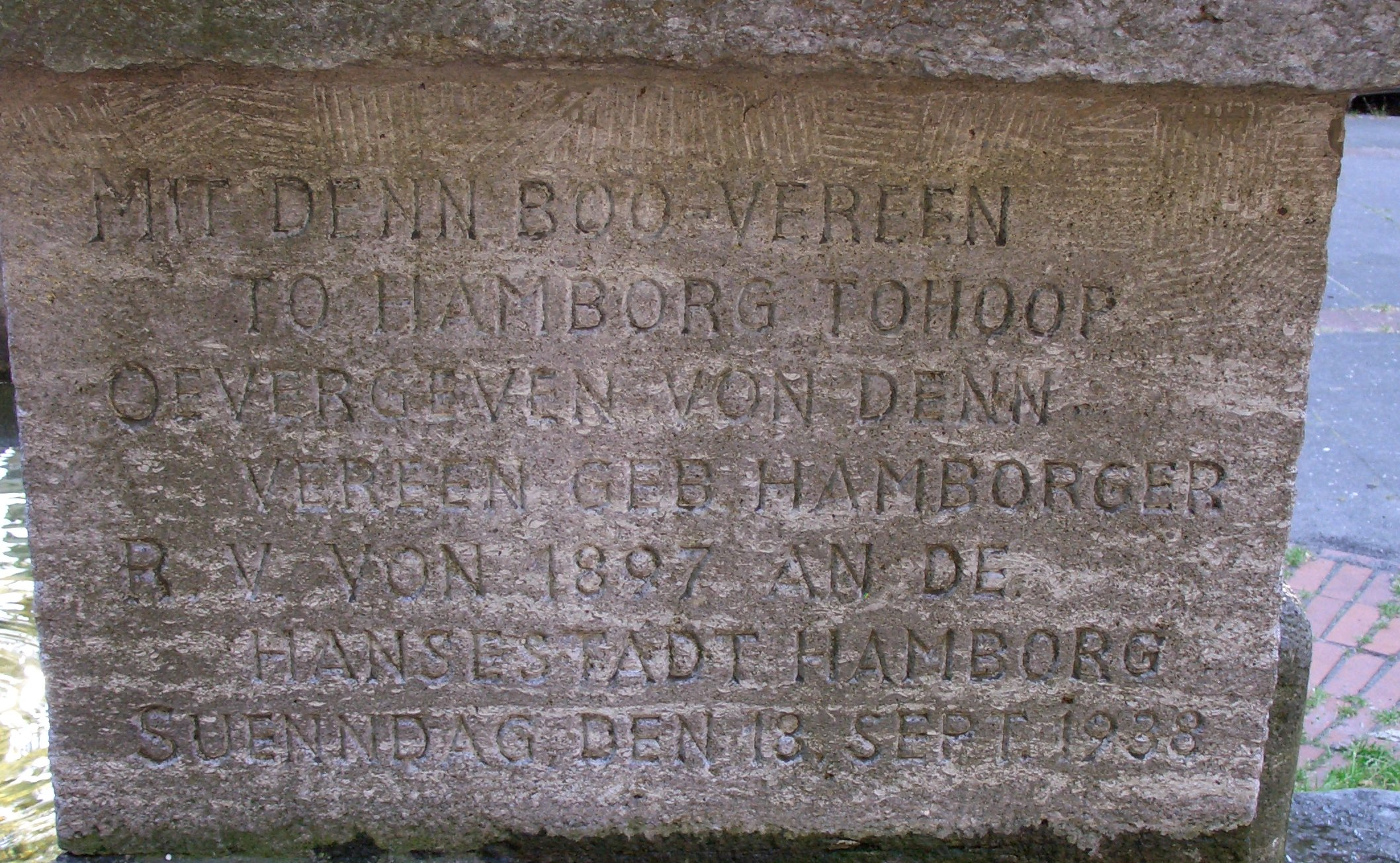 Inschrift auf dem Hummelbrunnen in Hamburg am Rademachergang: MIT DENN BOO-VEREEN TO HAMBORG TOHOOP OEVERGEVEN VON DENN VEREEN GEB. HAMBORGER RV VON 1897 AN DE HANSESTADT HAMBORG SUENNDAG DEN 13. SEPT. 1938 (hochdt. "Zusammen mit dem Bauverein zu Hamburg übergeben vom Verein geborener Hamburger RV von 1897 an die Hansestadt Hamburg Sonntag, den 13. Sept. 1938") Fotografiert am 23.6.2005 Lizenz: GNU Freie Dokumentationslizenz Habe ich selbst fotografiert.